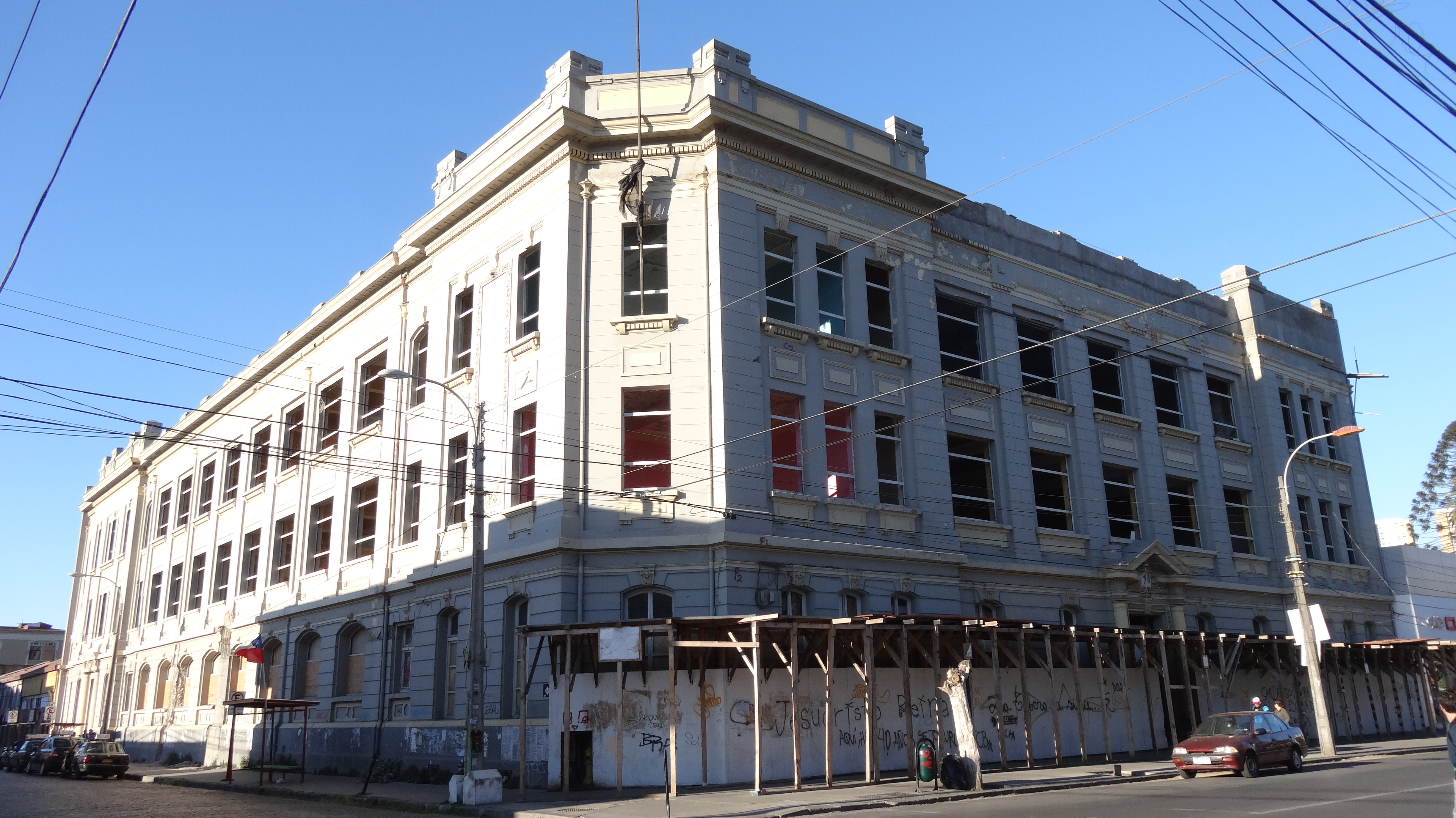 Escuela Ramón Barros Luco This is a photo of a national monument in Chile: 576